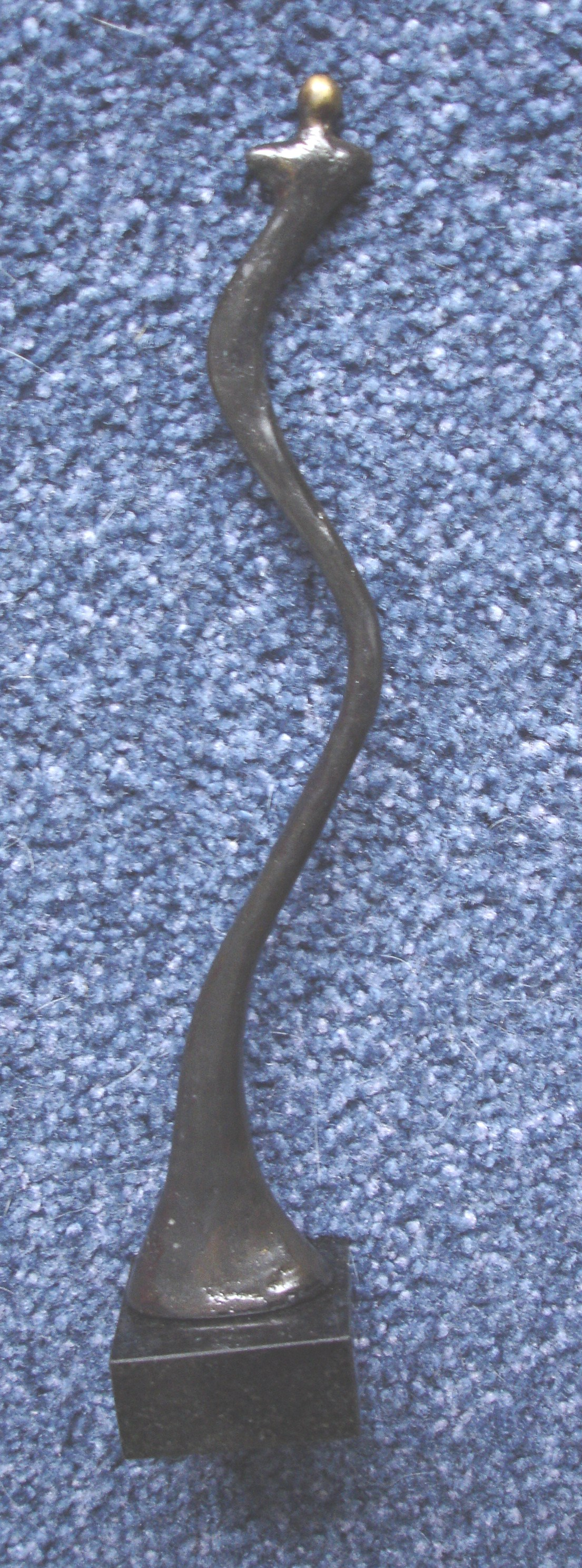 Bloodbank sculpture